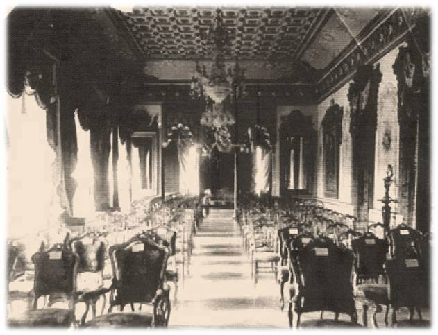 Salon de recepciones del Palacio de Gobierno antes de los terremotos de 1917-18